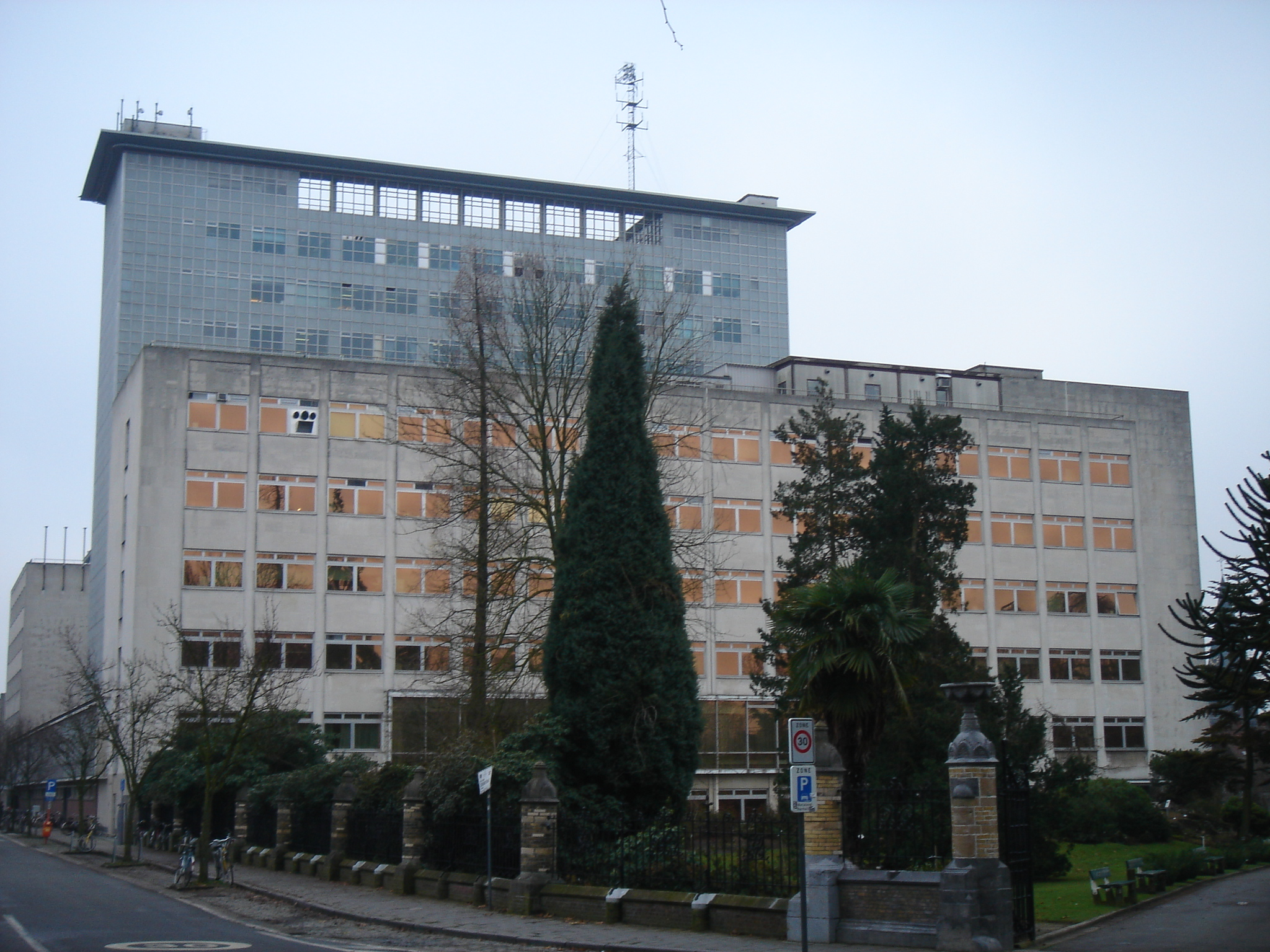 Campus Ledeganck, met op de voorgrond een klein gedeelte van de Gentse plantentuin.